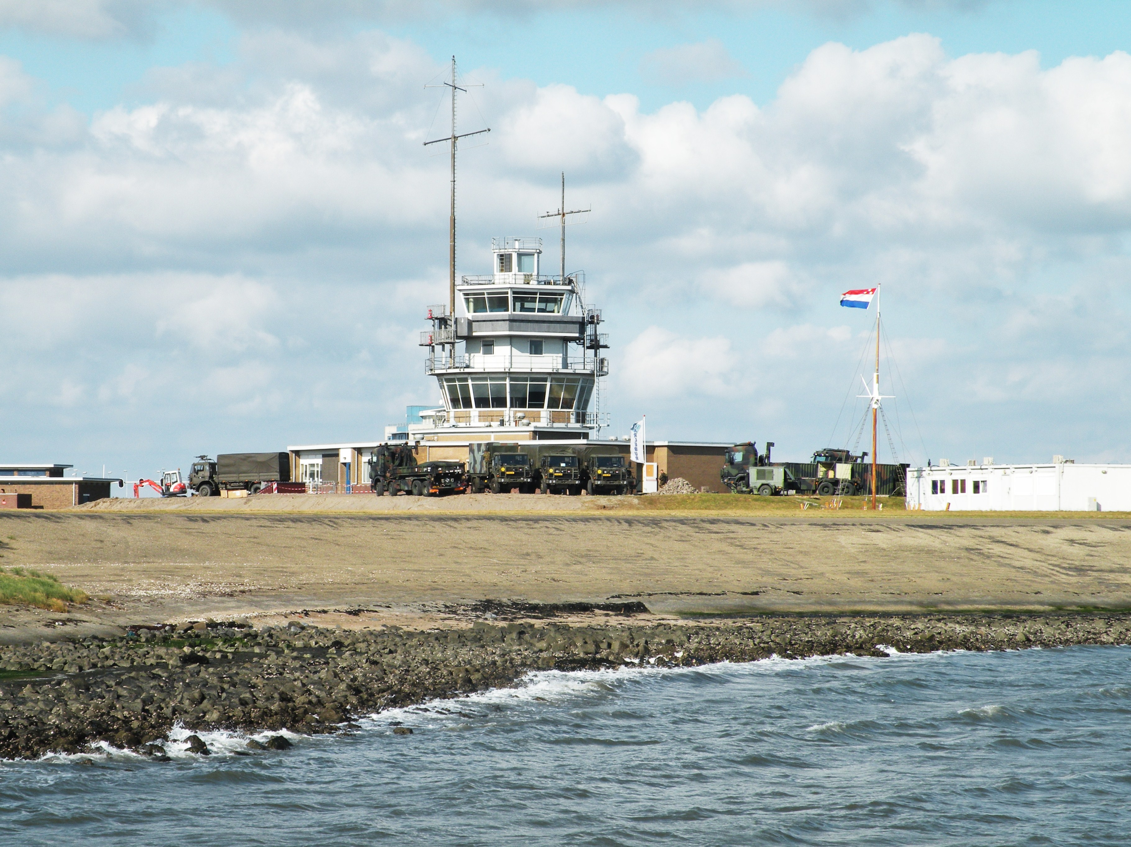 Toren Marinehaven, Den Helder